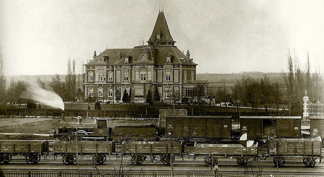 Zicht op Villa Wyckerveld in Wyck-Maastricht, vóór de bouw van het station in 1913. De villa werd in 1879-80 min of meer in het open veld gebouwd in opdracht van de Maastrichtse industrieel Eugène Regout naar een ontwerp van de Luikse architect J.-E. Rémont.